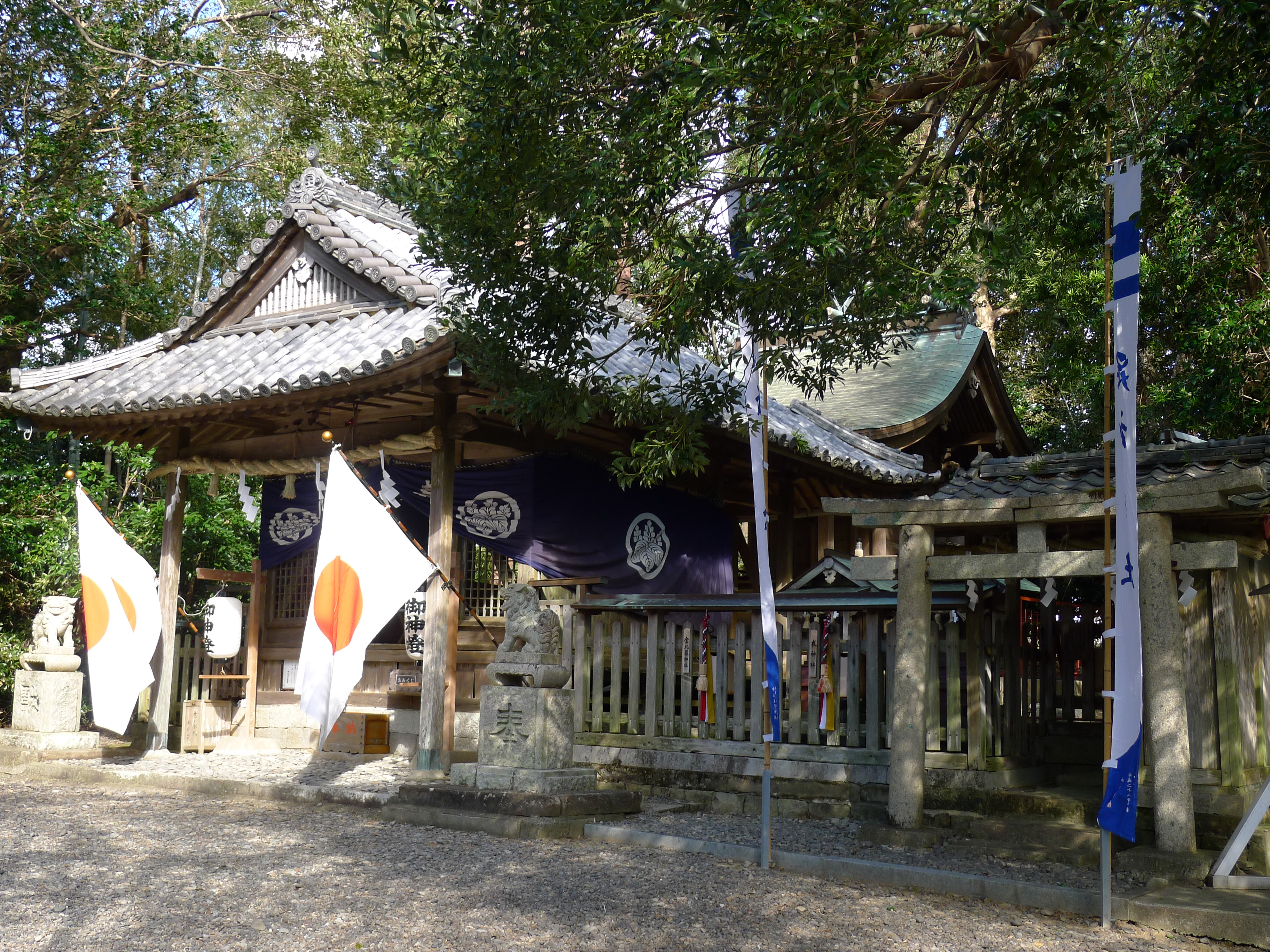 熊野古道・紀伊路の九十九王子の一つ切目中山王子を祀る中山王子神社（和歌山県印南町）